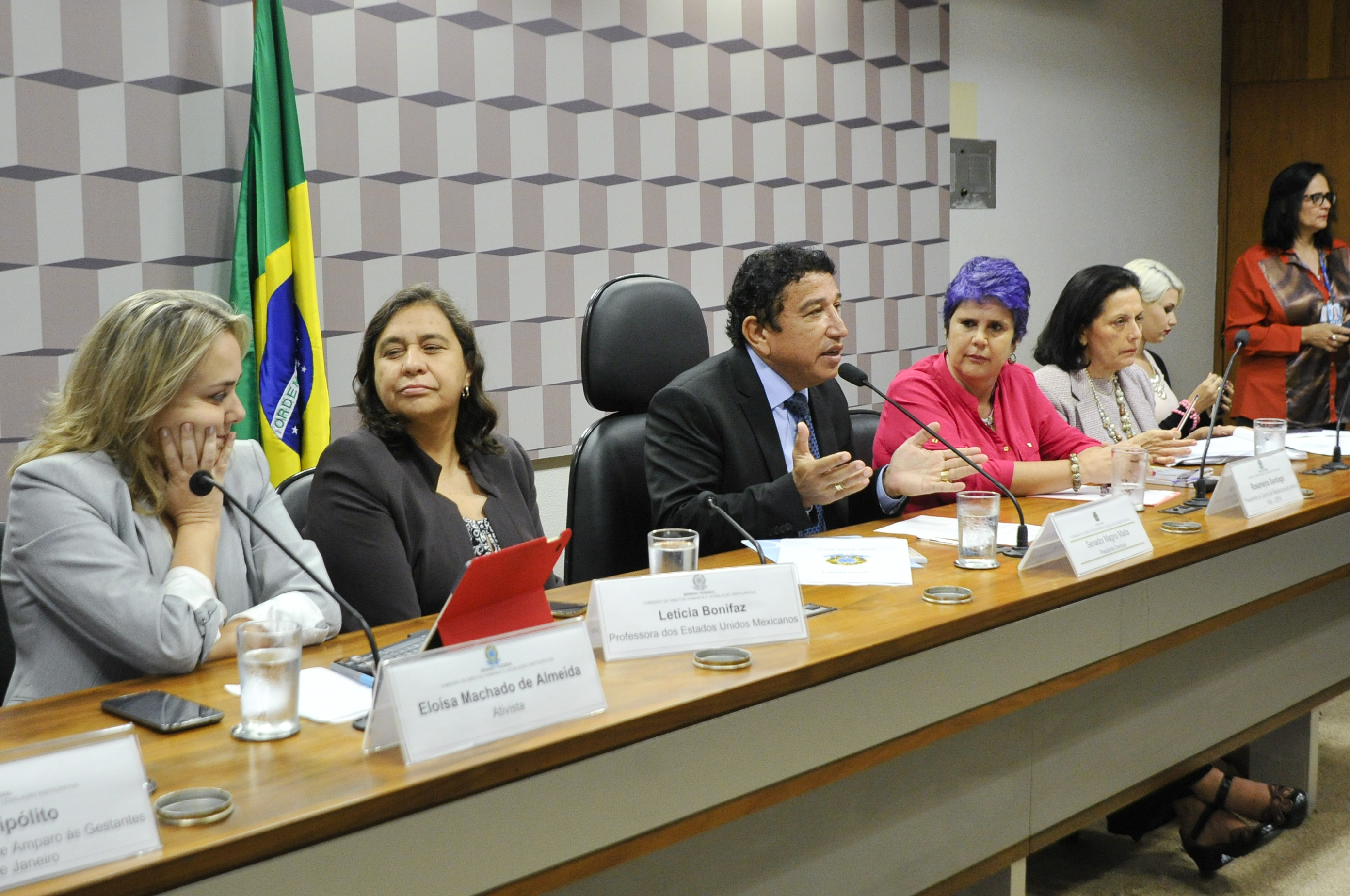 Comissão de Direitos Humanos e Legislação Participativa (CDH) realiza audiência interativa para instruir a Sugestão 15/2014, que regula a interrupção voluntária da gravidez, dentro das doze primeiras semanas de gestação, pelo SUS. Mesa (E/D): ativista Eloísa Machado de Almeida; senadora dos Estados Unidos Mexicanos, Letícia Bonifaz; presidente eventual da CDH, senador Magno Malta (PR-ES); presidente do Centro de Reestruturação para a Vida - (Cervi), Rosemeire Santiago; advogada e ativista Leila Linhares; ativista Pró-Vida de São Paulo, Sara Winter Foto: Geraldo Magela/Agência Senado